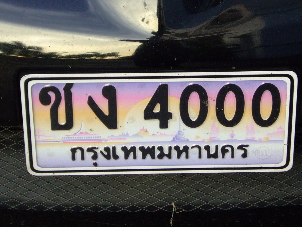 Nuova targa della città di Bangkok foto propria